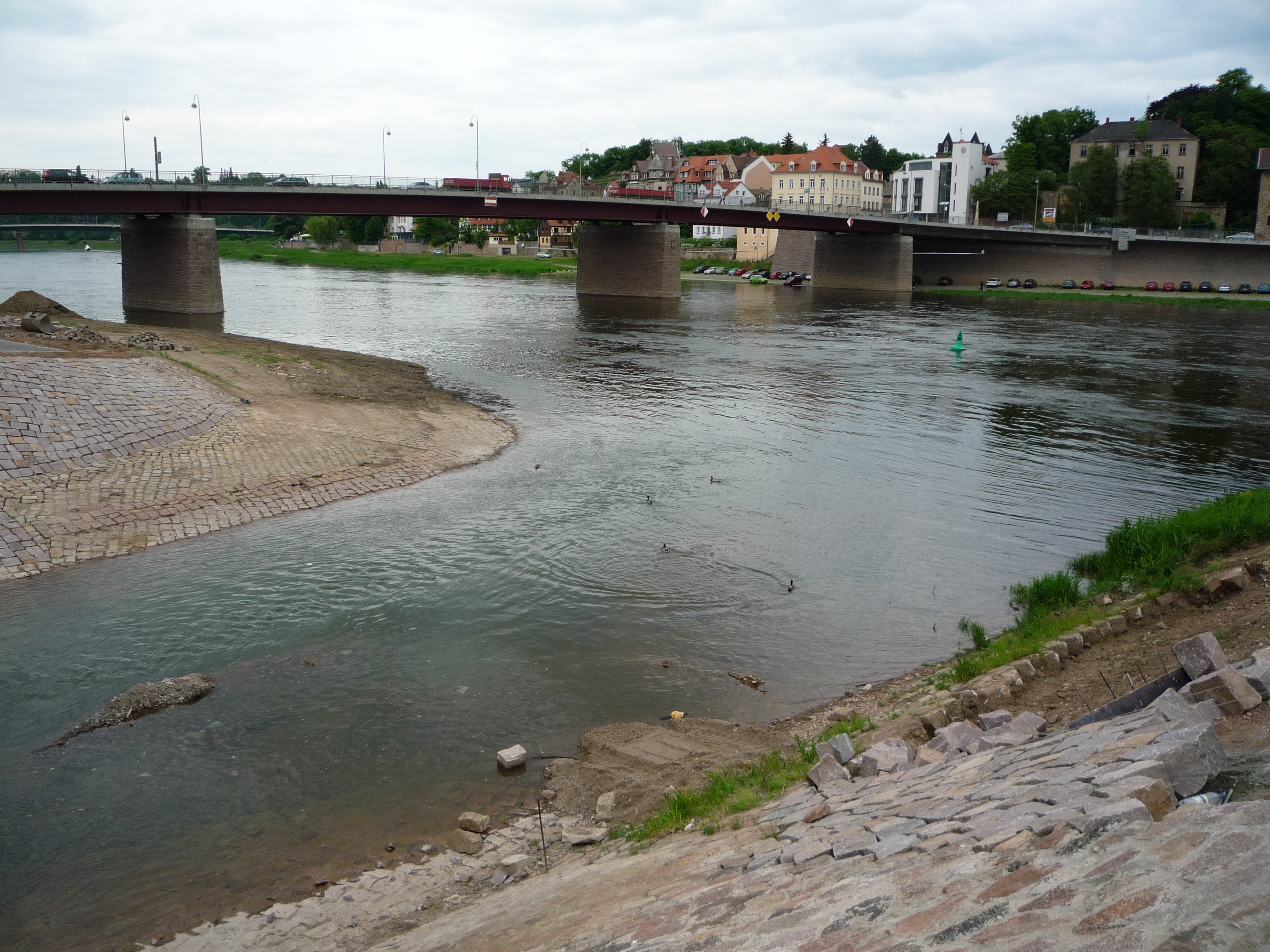 Die Mündung der Triebisch in die Elbe in Meißen.